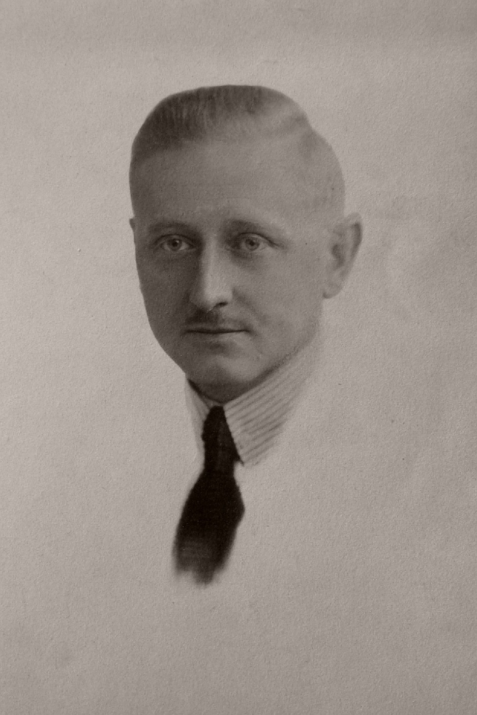 Porträtfotografie von Walther Jaensch